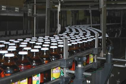 Brasserie de Bourbon brewery